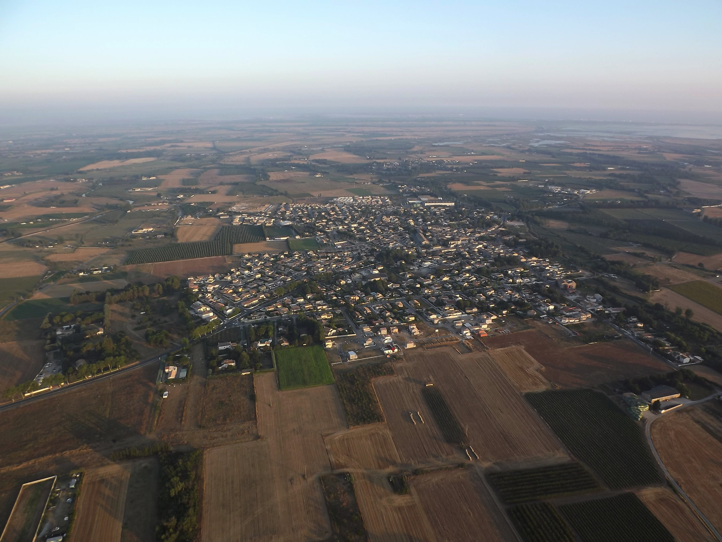 Vue aérienne de Saint-Just (Hérault)